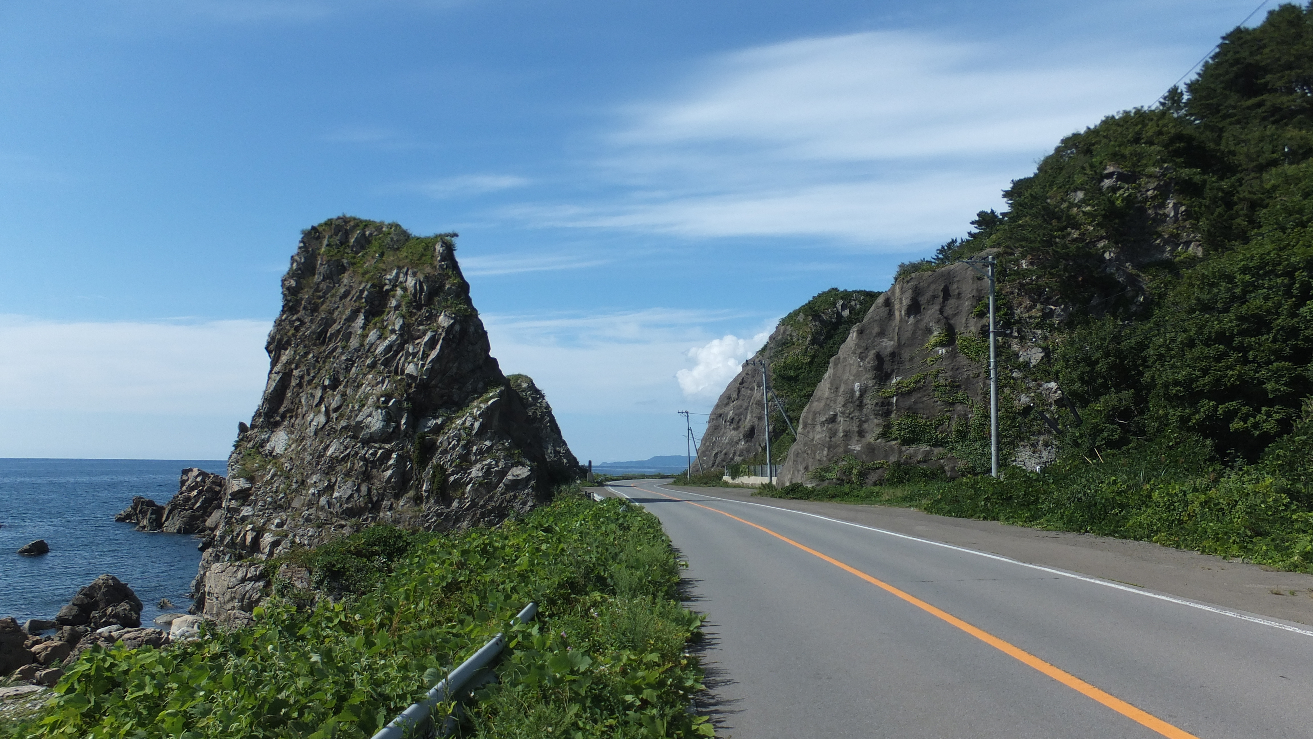 大間越海岸の奇岩景勝を縫って走る国道101号（青森県深浦町）